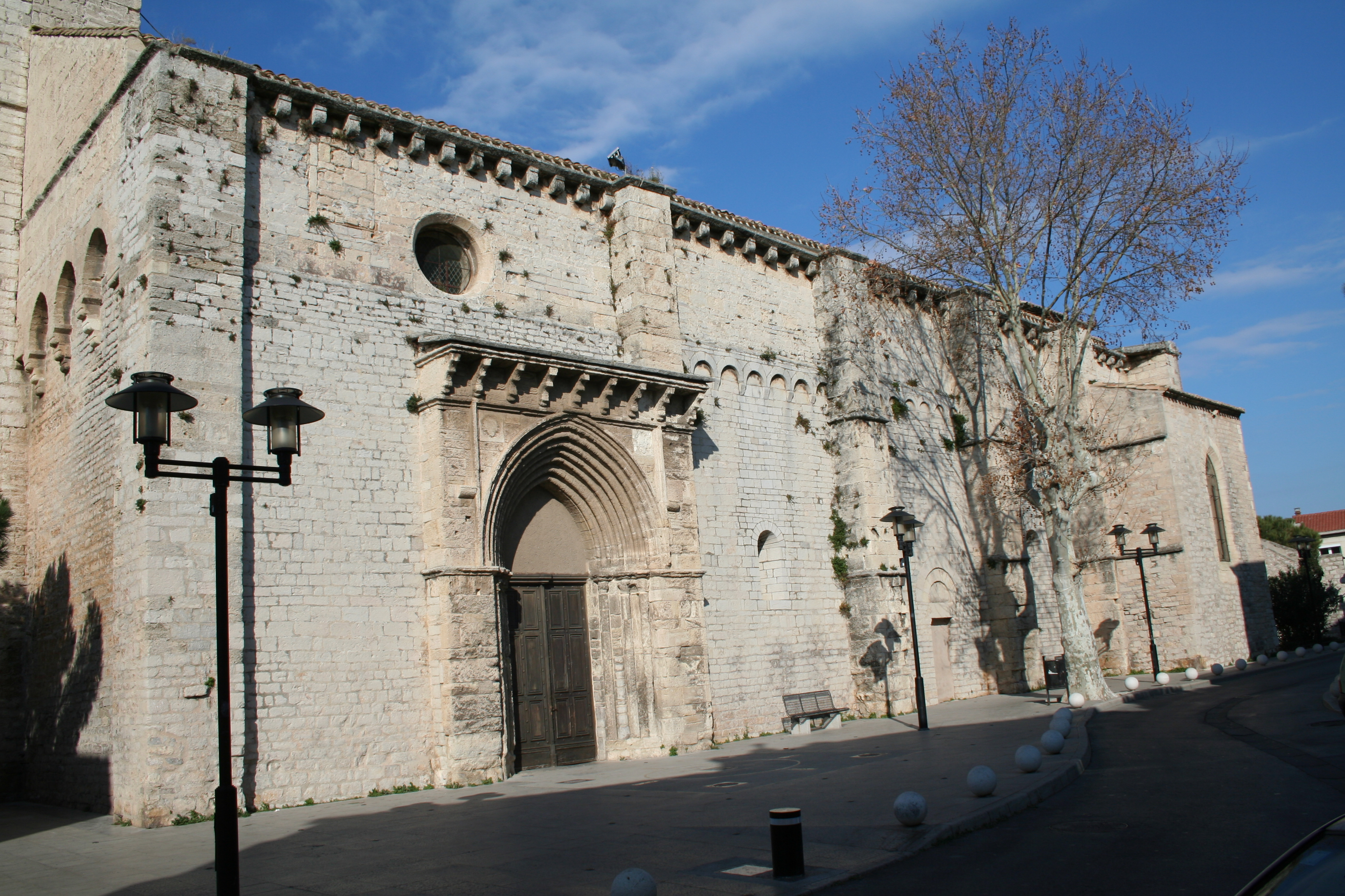 Frontignan (Hérault) - Église Saint-Paul - Portail d'entrée et mur de l'église romane.